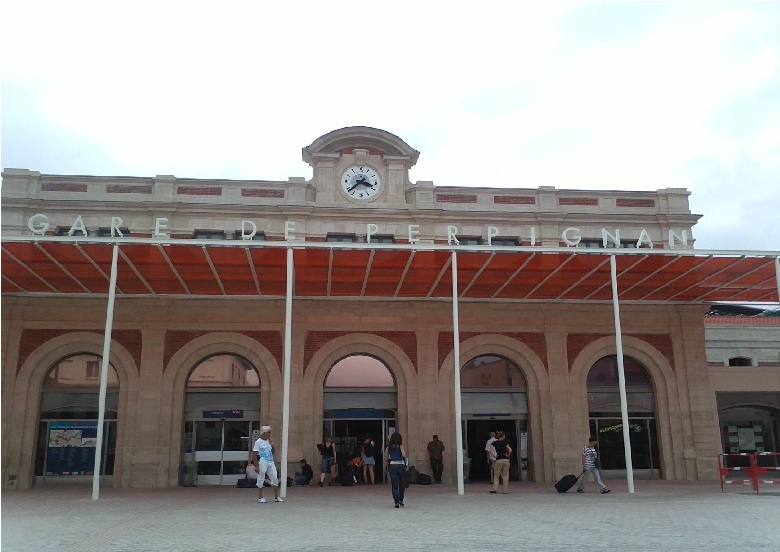 Gare de Perpignan-2012